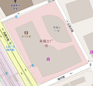 会乐里，原为上海知名红灯区。